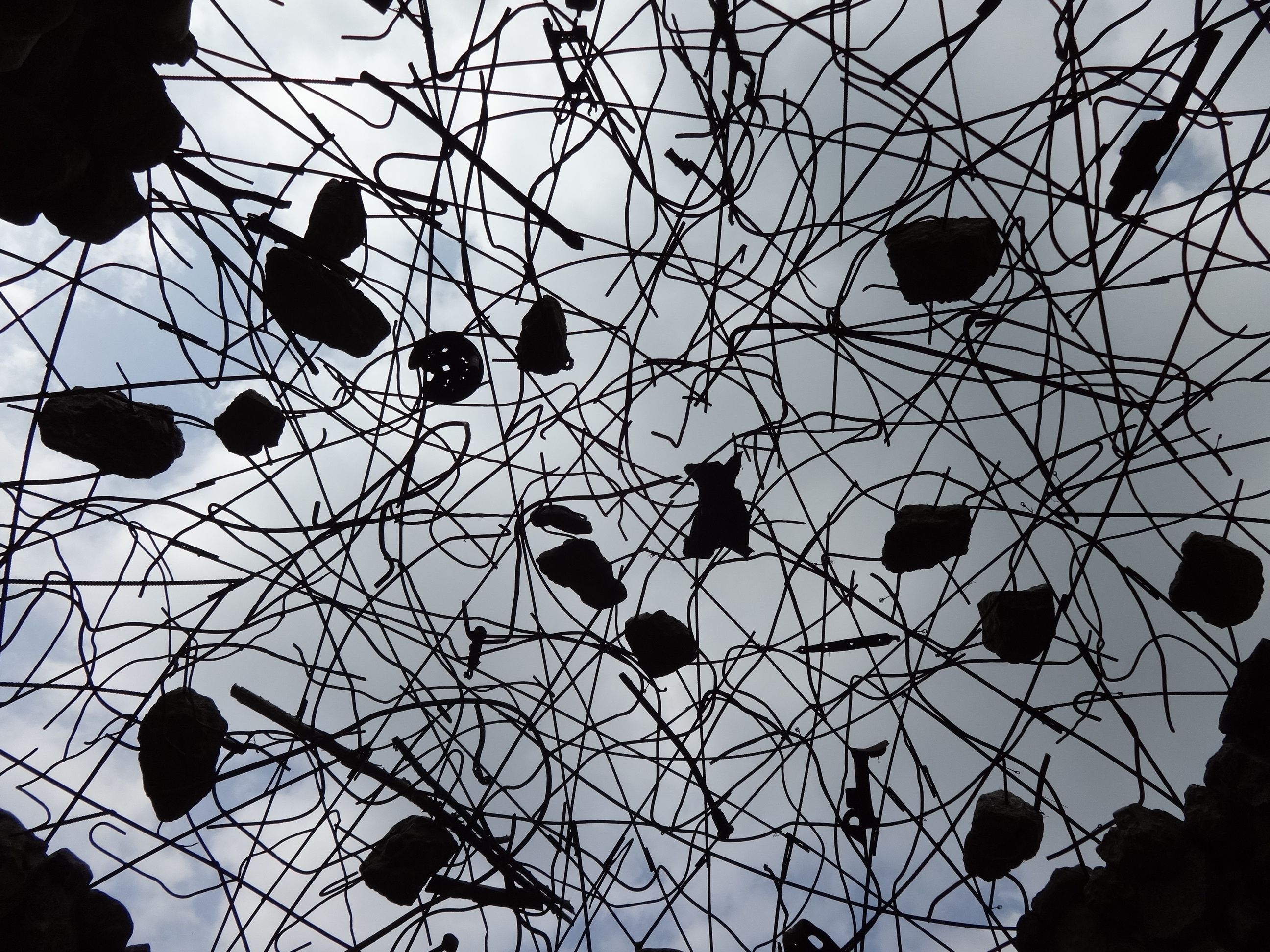 Projekt des kanadisch-schweizerischen Installationskünstlers Ernest Daetwyler in Pasewalk. Er schuf auf 30 Tonnen Trümmern des Zweiten Weltkrieges eine 5,5 Meter hohe begehbare Kugel in Pasewalk, Mecklenburg-Vorpommern.